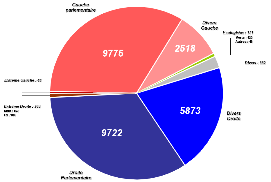 Elus municipaux dans les communes de plus de 3500 habitants après les élections municipales françaises de 2001.